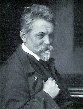 Der deutsche Maler Fritz Reiss